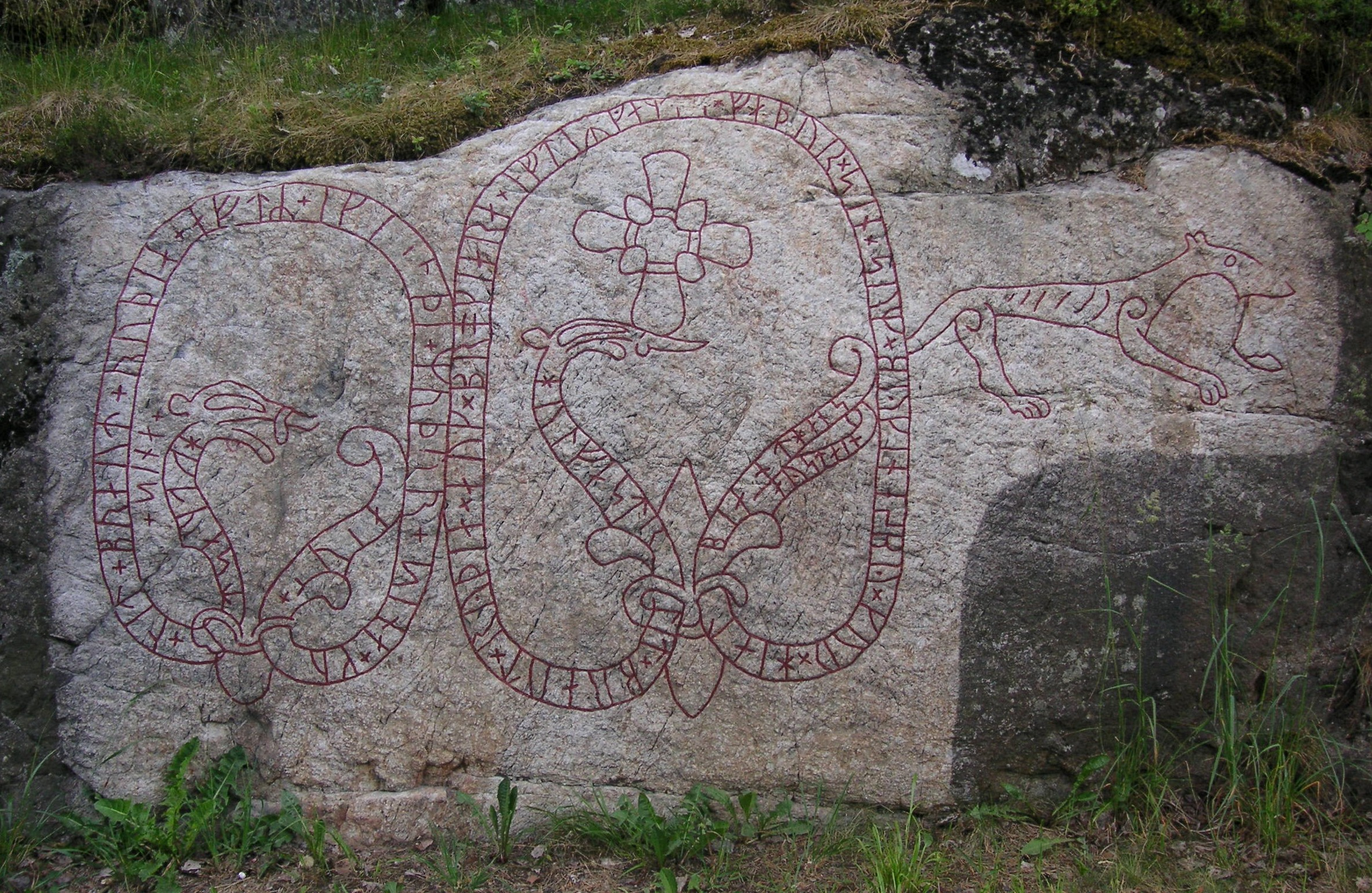 Södermanlands runinskrifter 311-313 är en runinskription i omedelbar anslutning till Holmfastvägen i Södertälje i Sörmland